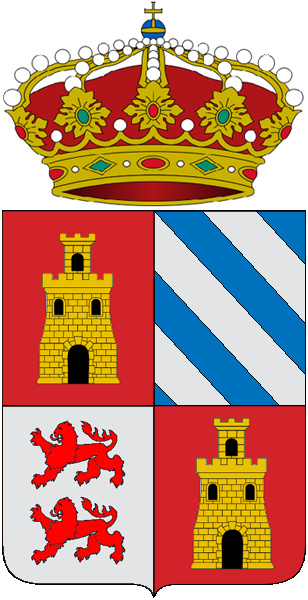 Escudo de Valle de Sedano, en Burgos (España)